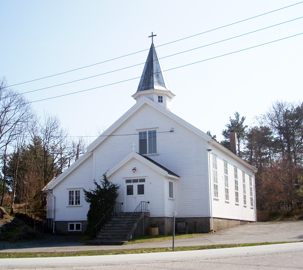 Kongshavn kapell på Kongshavn, Tromøy, Arendal